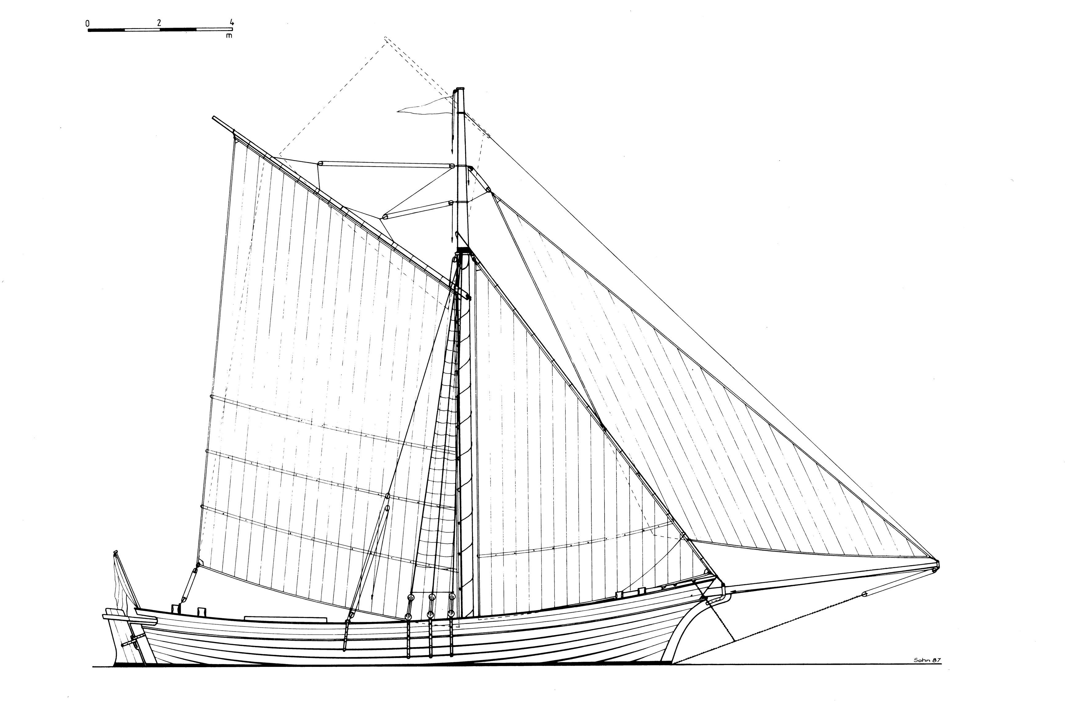 Takelriss der Quatze Hildegard von 1918, Zeichnung nach Plänen von K. Manthe, Stettin